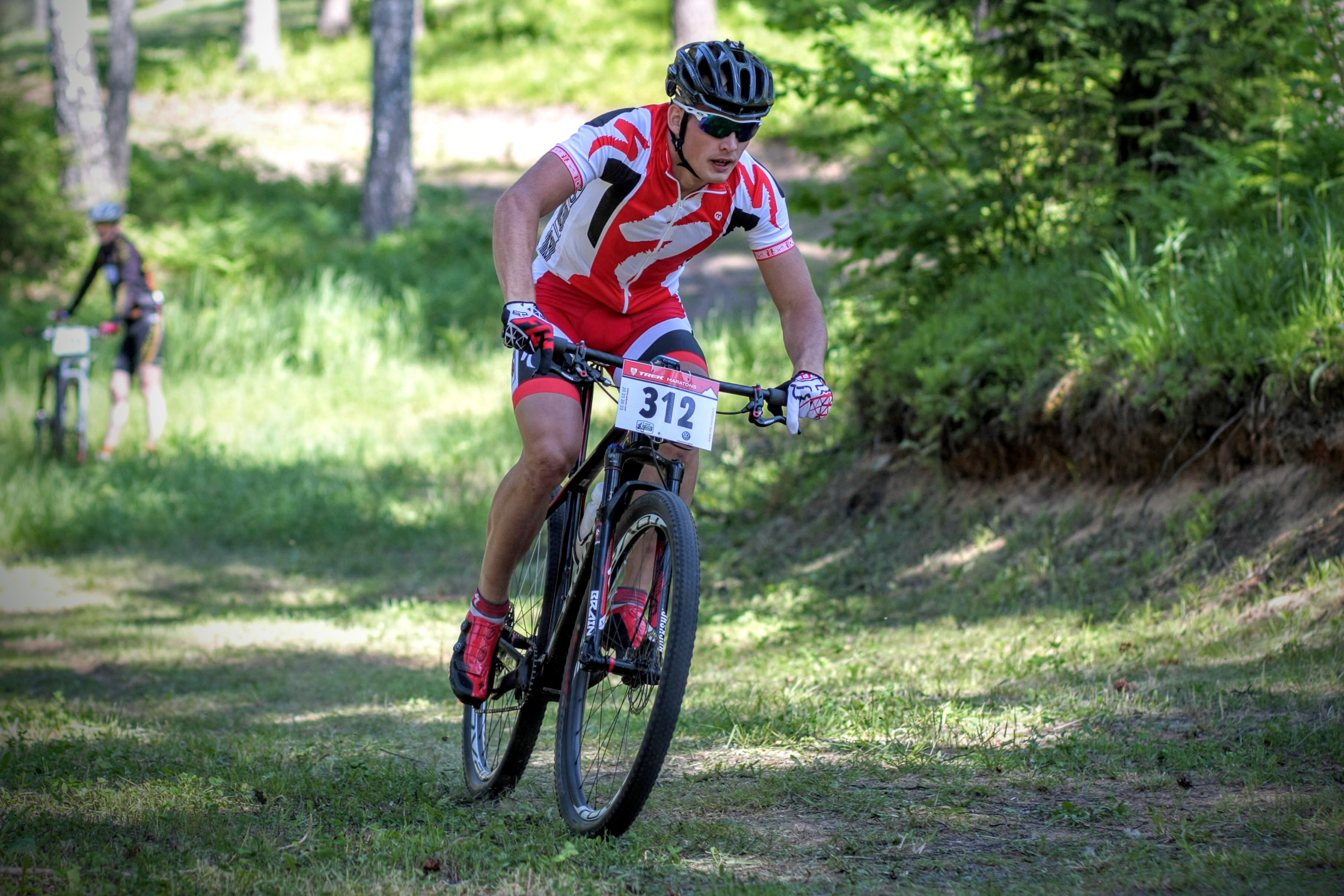 Arnis Pētersons, Baldones MTB maratons, 2015